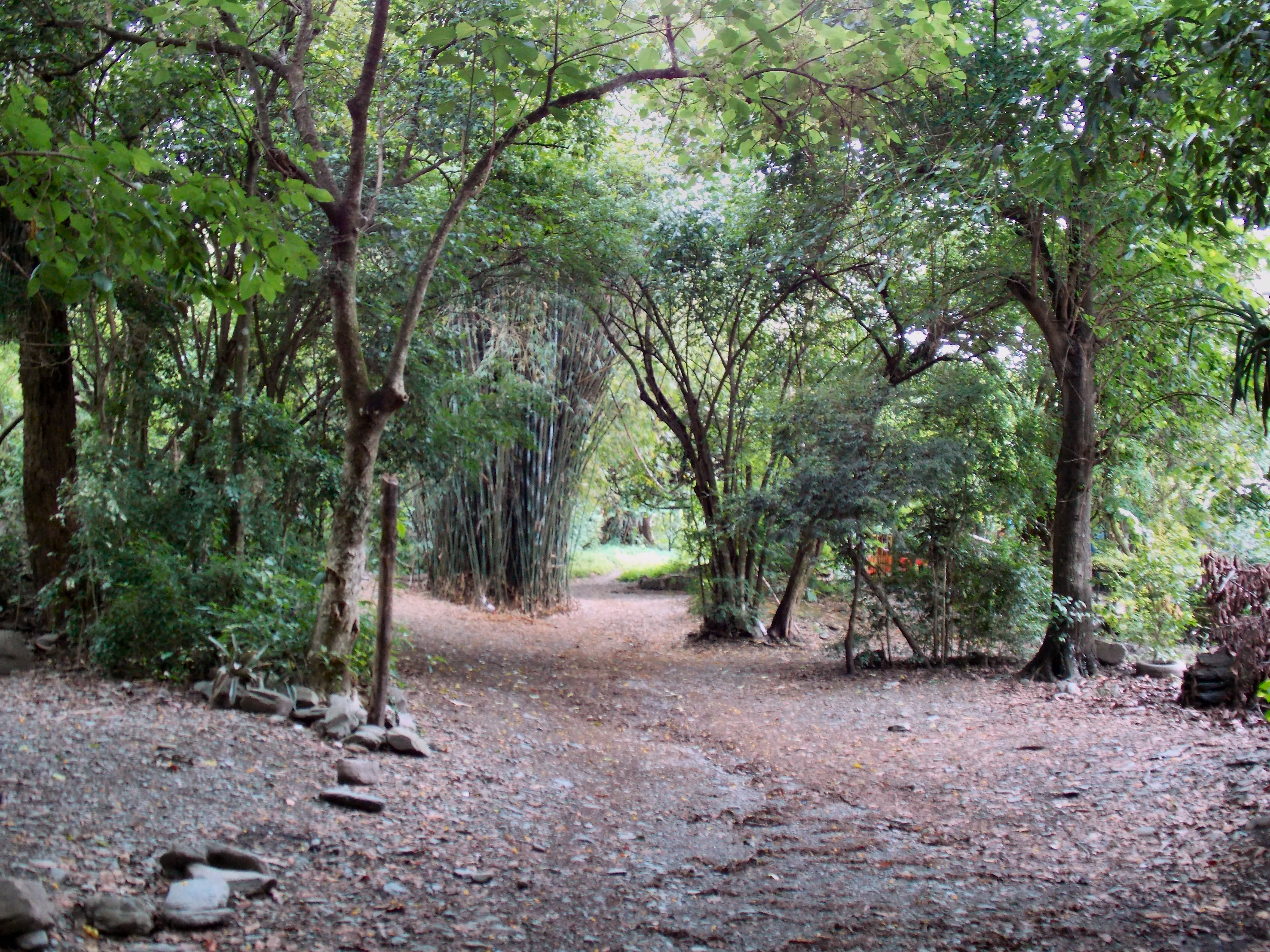 Detalle del sendero